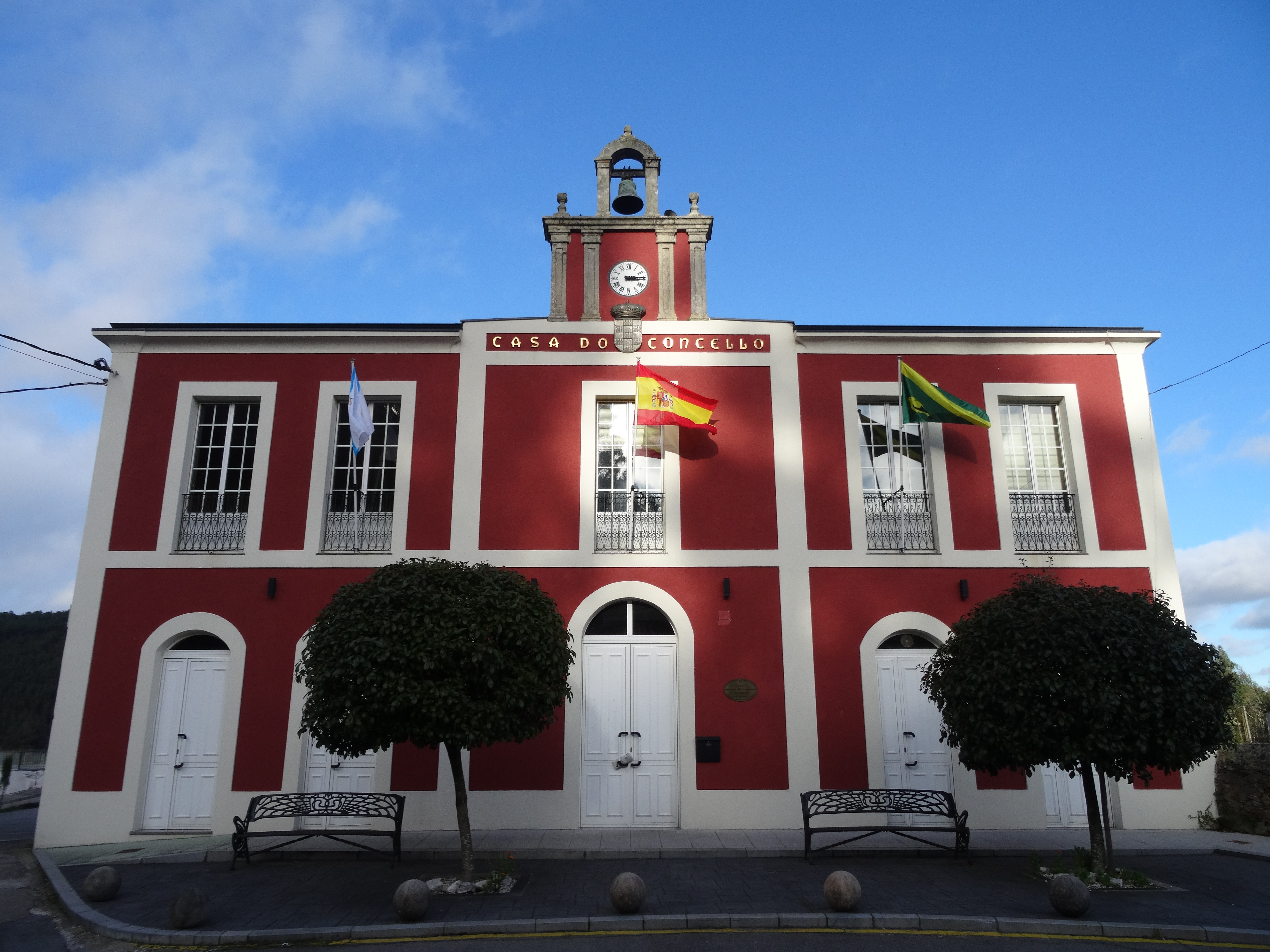 Ver título.